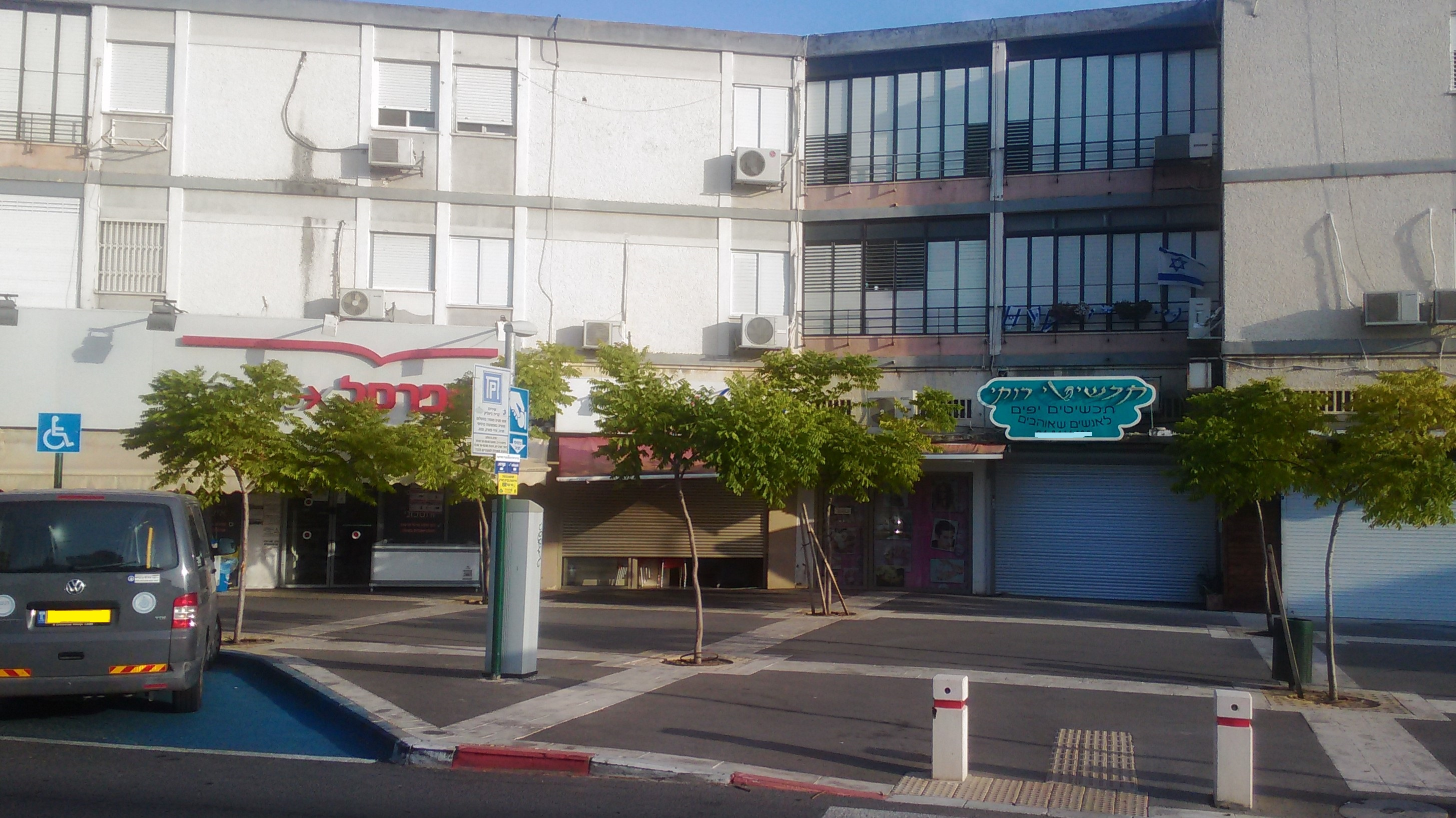 מרכז מסחרי בקריית ביאליק